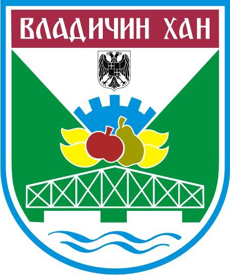 Blason de la ville de Vladičin_Han, en Serbie